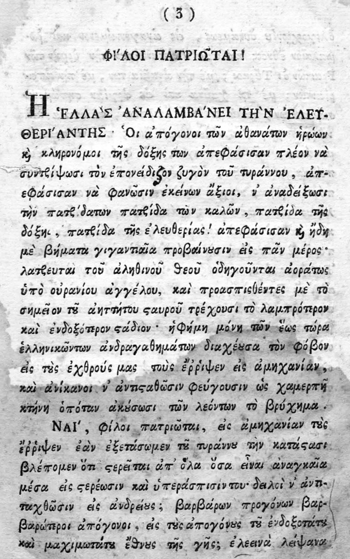 Beginning of Protropi patriotiki pros to genos ton grekon(Προτροπή πατριωτική προς το γένος των γραικών)